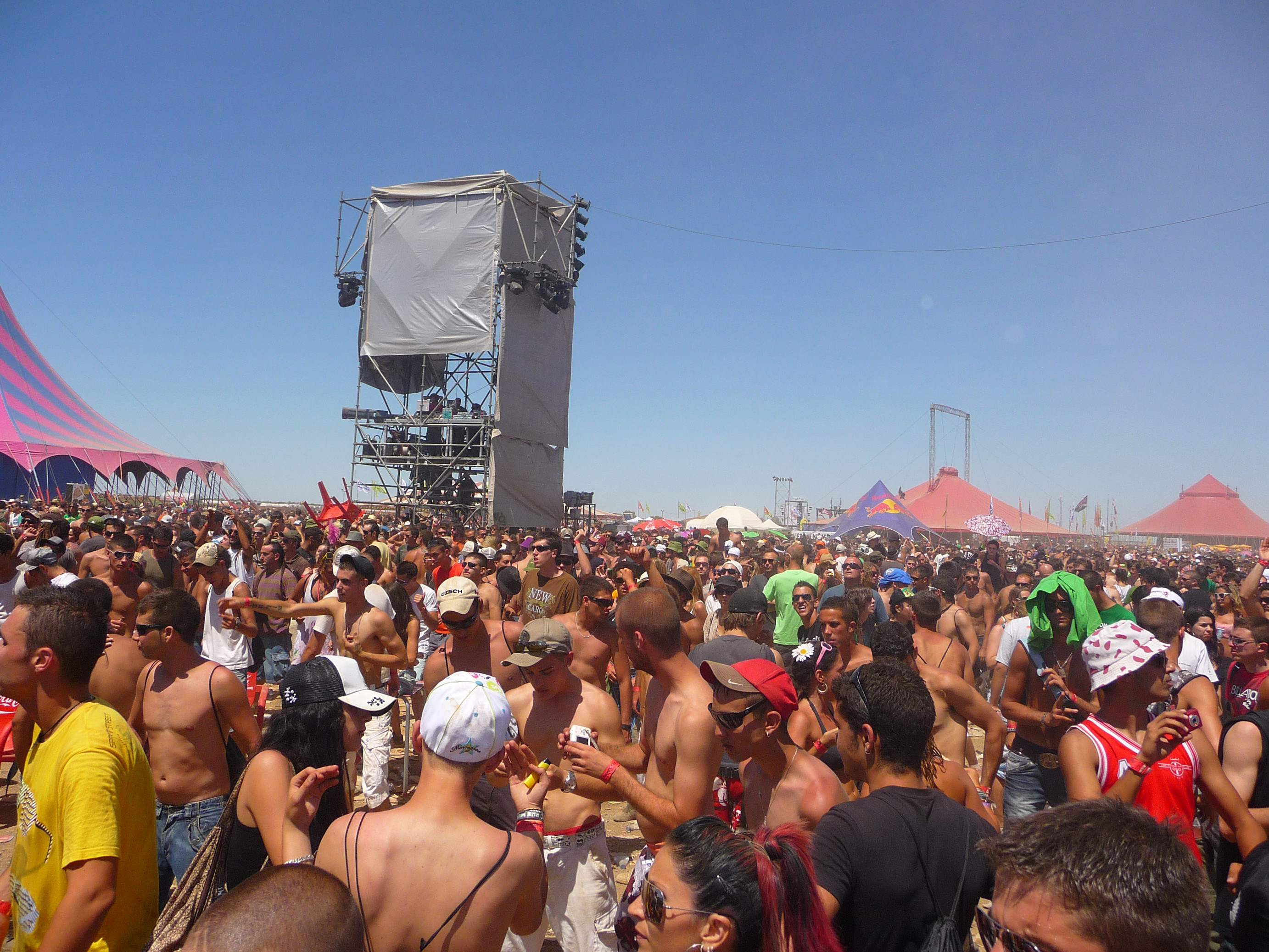 Monegros Desert Festival - Vista general a las 13 horas